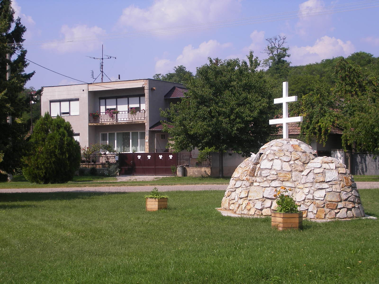 Kisgyarmat